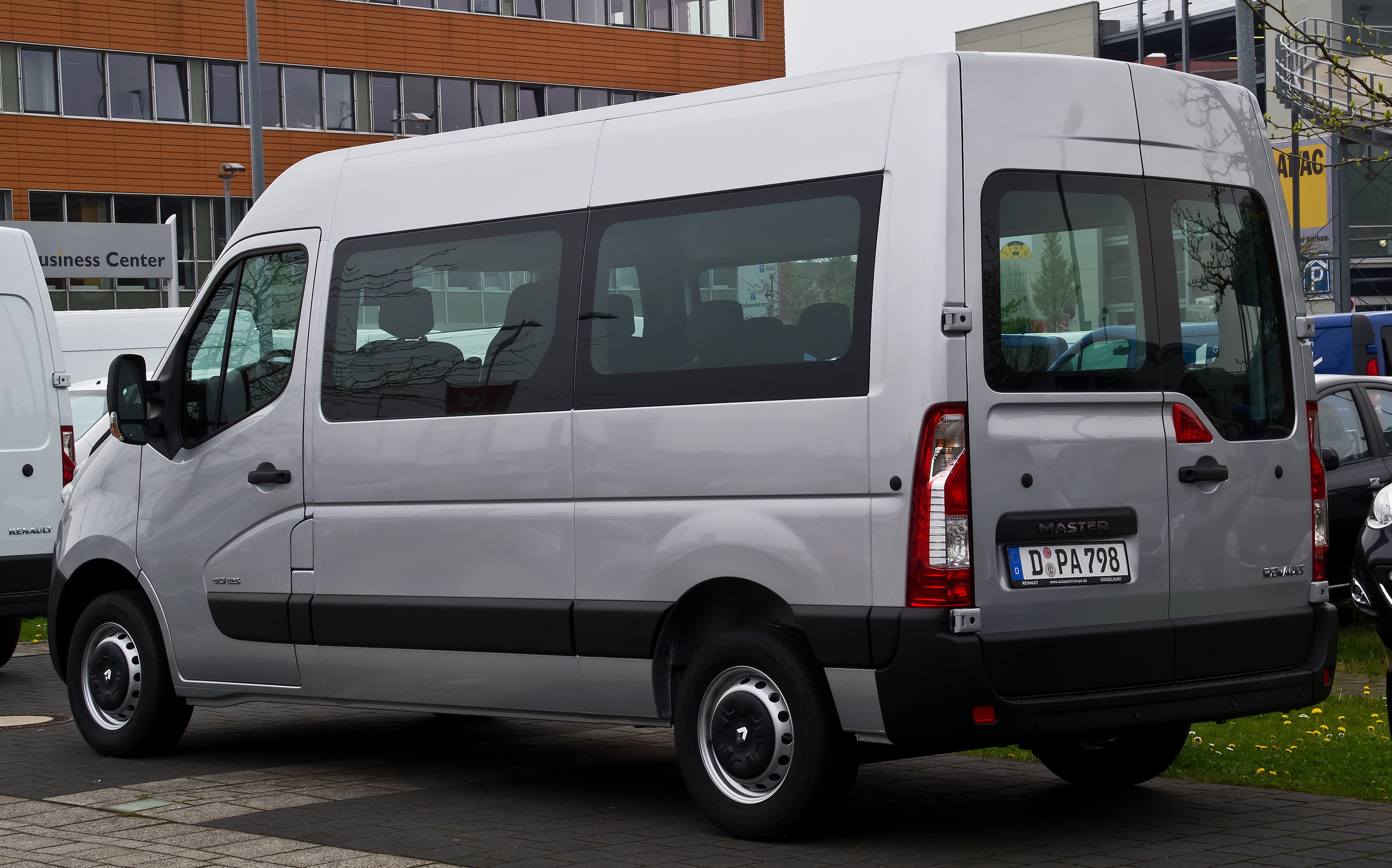 Renault Master Combi dCi 125 (III)